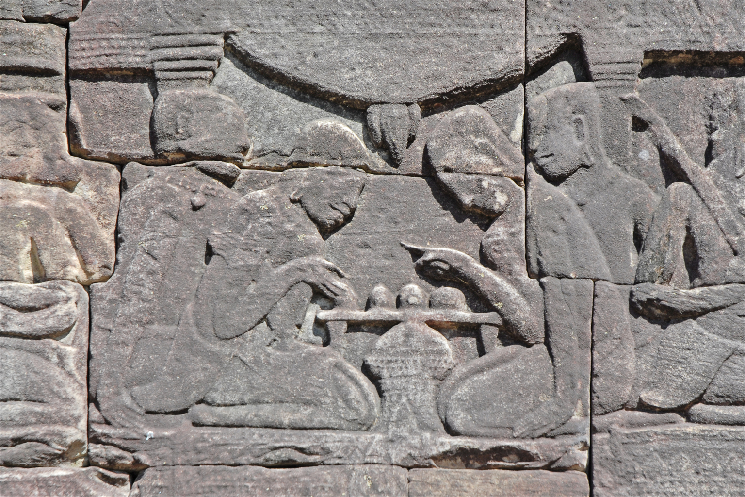 Scène de jeu (échec ?) entre khmers Galerie sud du Bayon (Angkor) _________________ Le Bayon est le temple-montagne du roi khmer : Jayavarman VII (1181-1218), le vainqueur des Chams et le plus grand constructeur des rois khmers. La construction du Bayon a commencé vers 1195. Ce temple est célèbre pour ses 54 tours décorées par 4 visages. Comme temple d'Etat, il était au centre d'Angkor Thom, la capitale du royaume. C'est un temple "œcuménique " qui associe l'hindouisme (les dieux Shiva et Vishnu y sont largement présents) et le bouddhisme car le Roi était lui-même bouddhiste du grand véhicule : Mahâyâna. Le Roi et la famille royale étaient représentés dans le Bayon sous forme de bouddhas dans les chapelles entourant la grande tour centrale.